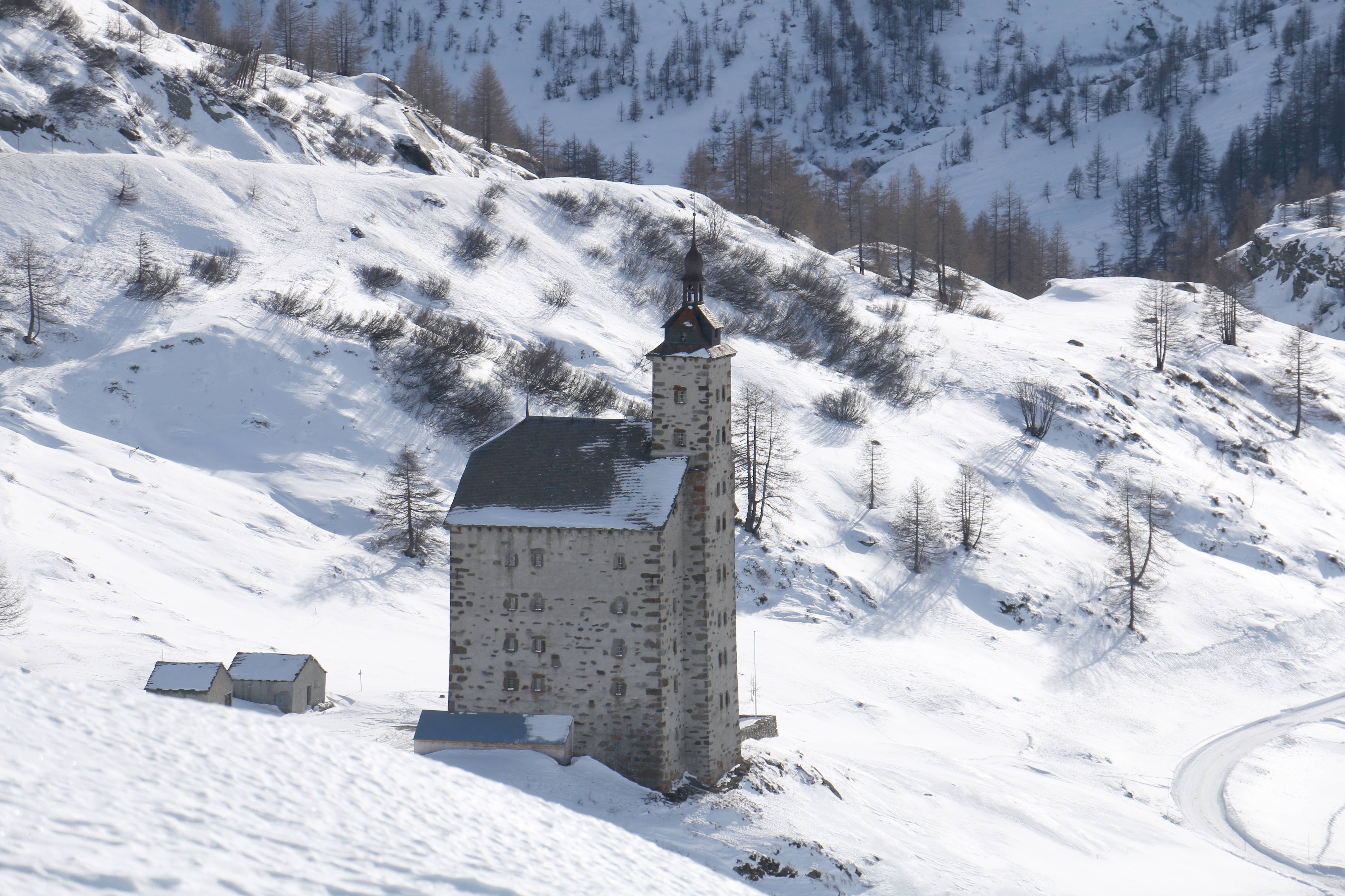 Das Alte Hospiz im Winter